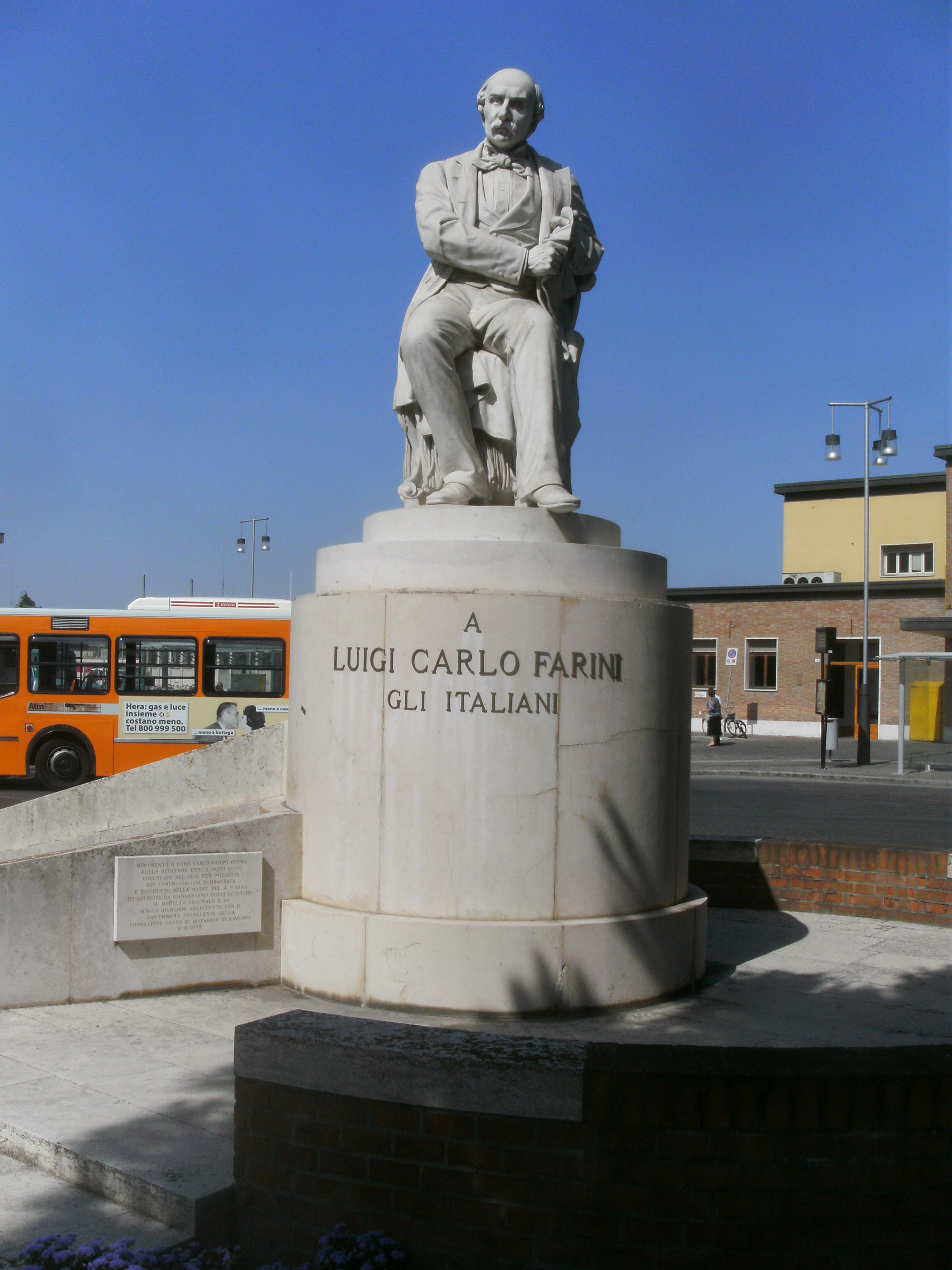 Ravenna, Denkmal des Diktators der Emilia und Ministers Farini (Skulptur wurde in der Nacht des 4. September 1944 durch einen Bombenangriff der Alliierten zerstoert und nach dem Krieg anhand des Originalteile nachgebildet).